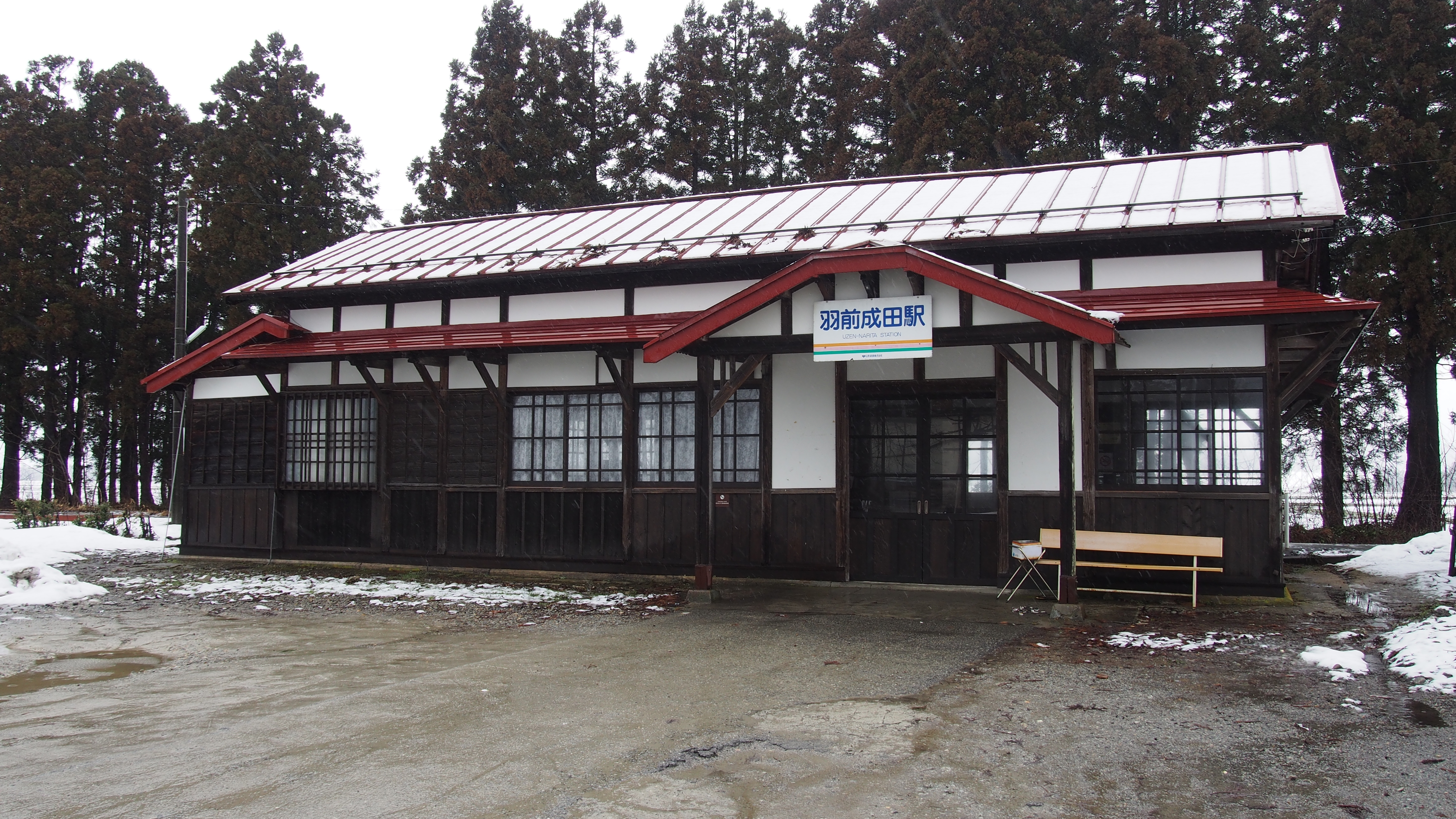 山形鉄道フラワー長井線・羽前成田駅